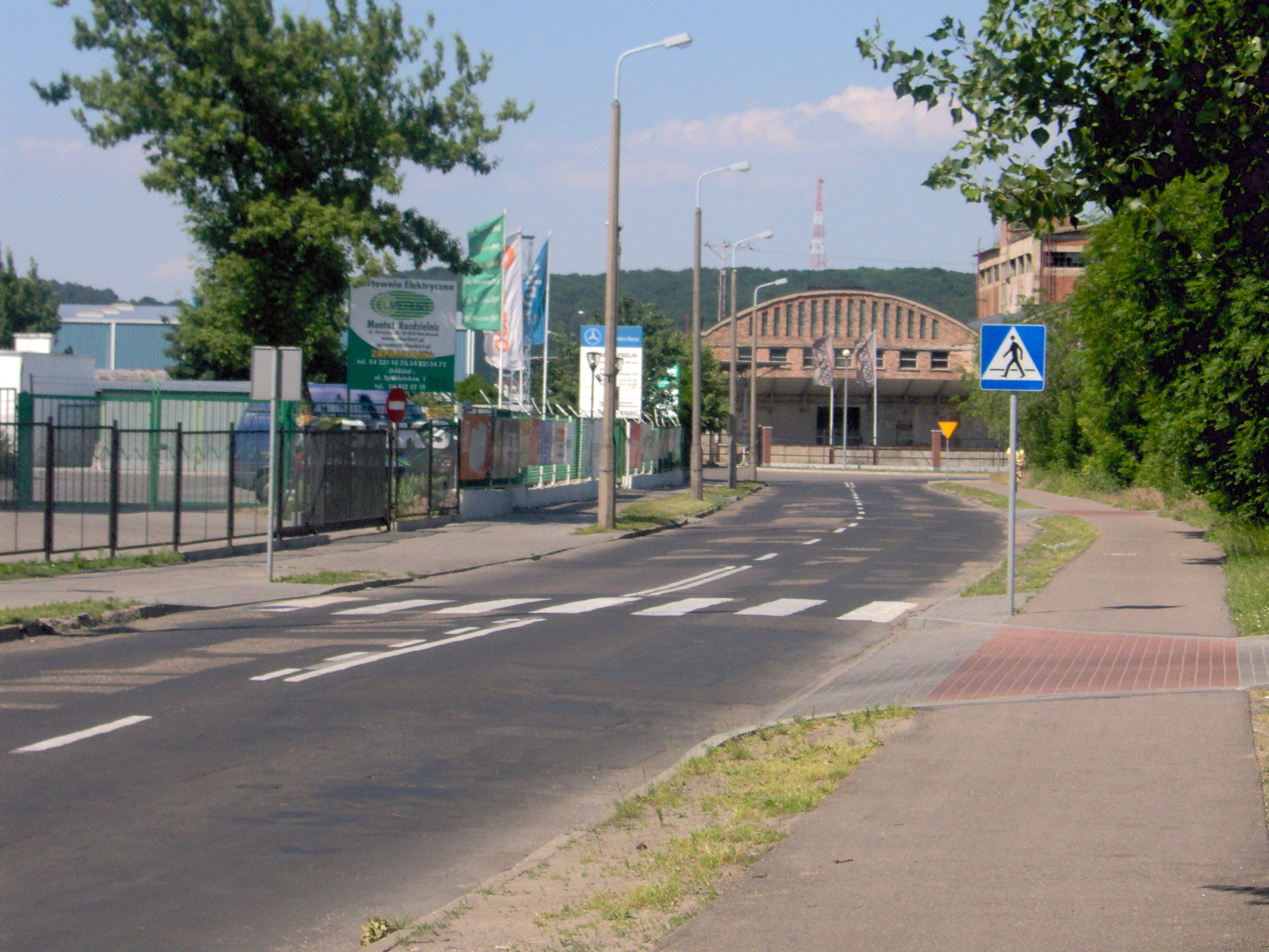 Pozostałości po celulozie (2007 r.)